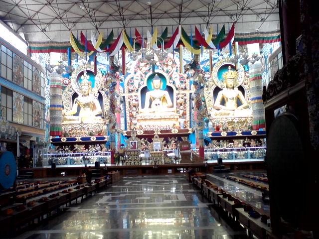 the holy statues of budha, amithayuh and padmasambhava who is the founder of tibatan budhisam